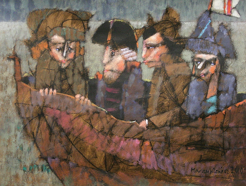 Adam Marczukiewicz "Swamp Patrol" gwasz/papier 50 x 65 cm 2010 r.